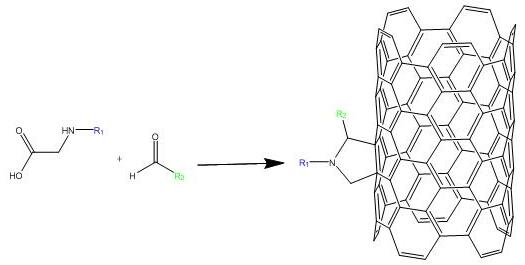 fig 8